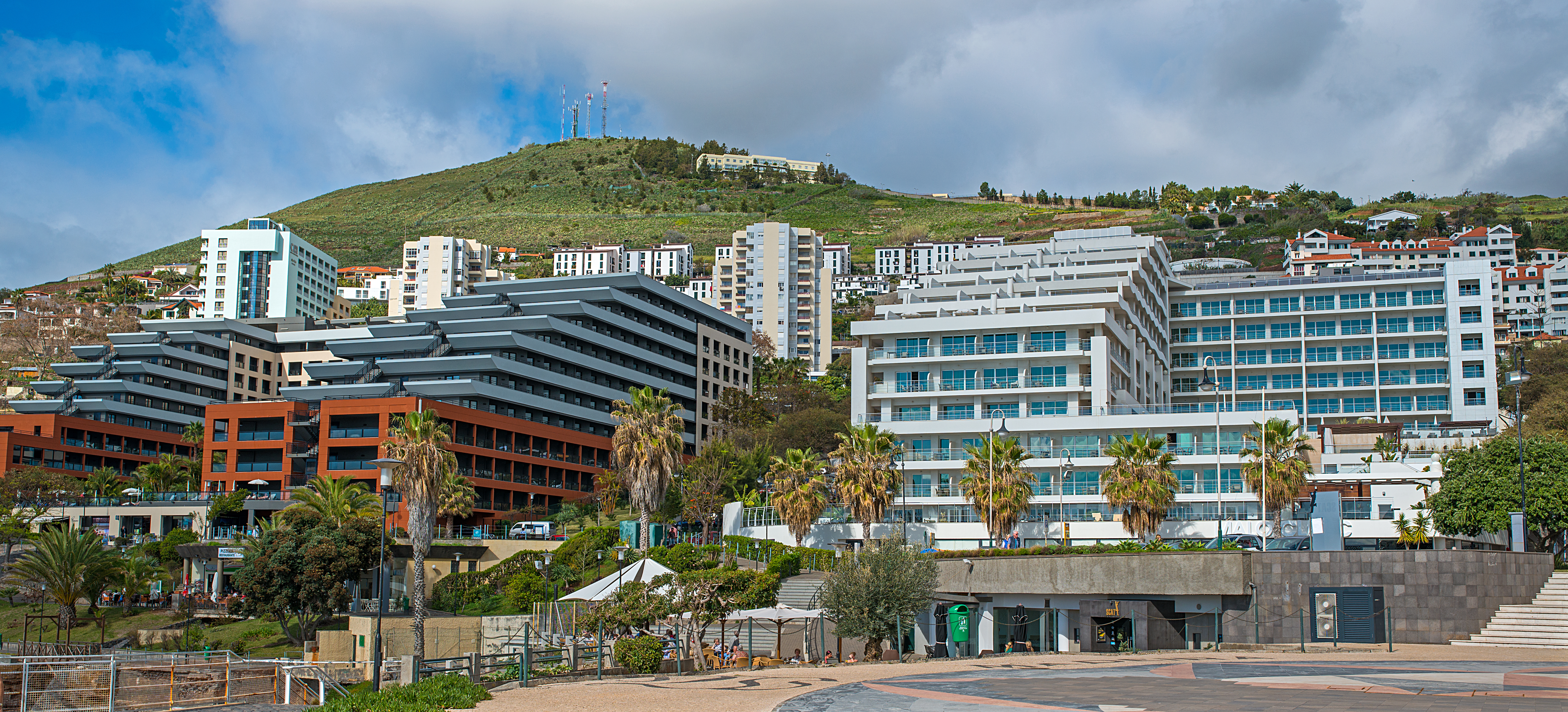 Funchal Madeira Portugal January 2014